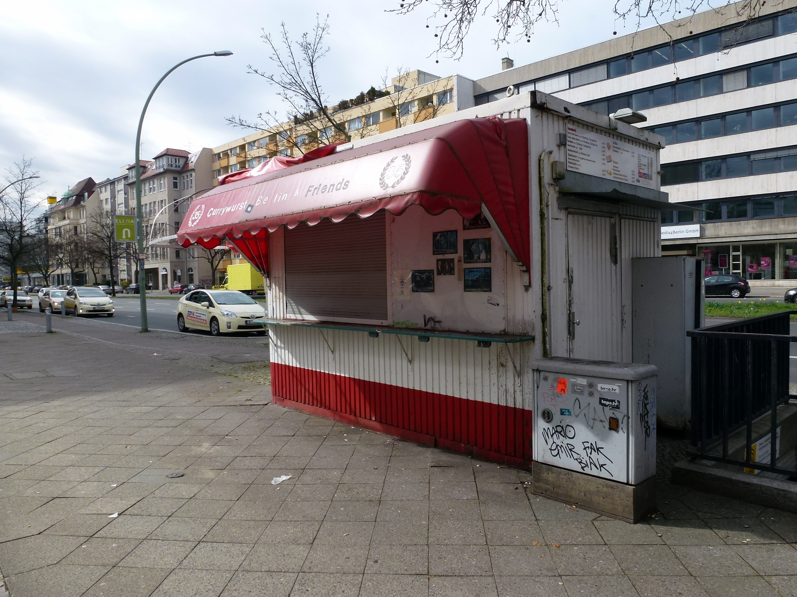 Imbiss Bundesallee in Berlin-Wilmersdorf. Bekannt aus Wim Wenders Film "Der Himmel über Berlin"